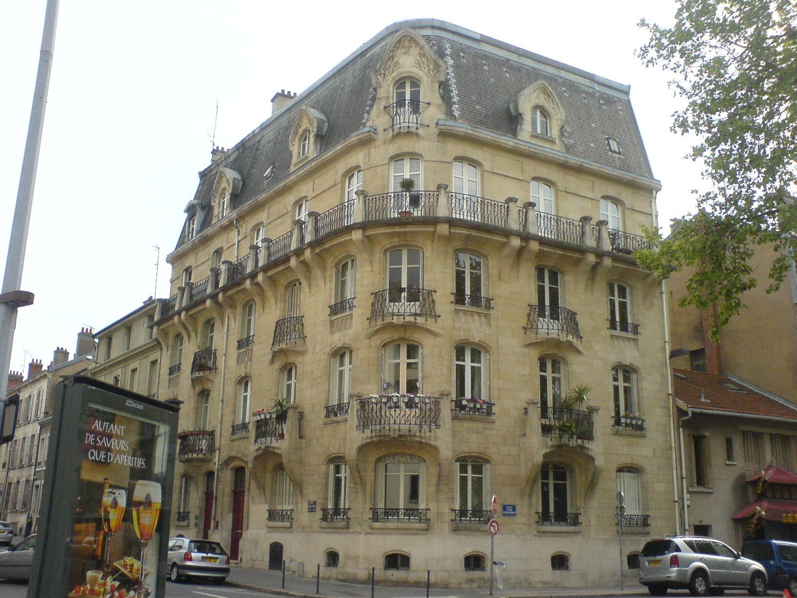 Artnouveau nancy